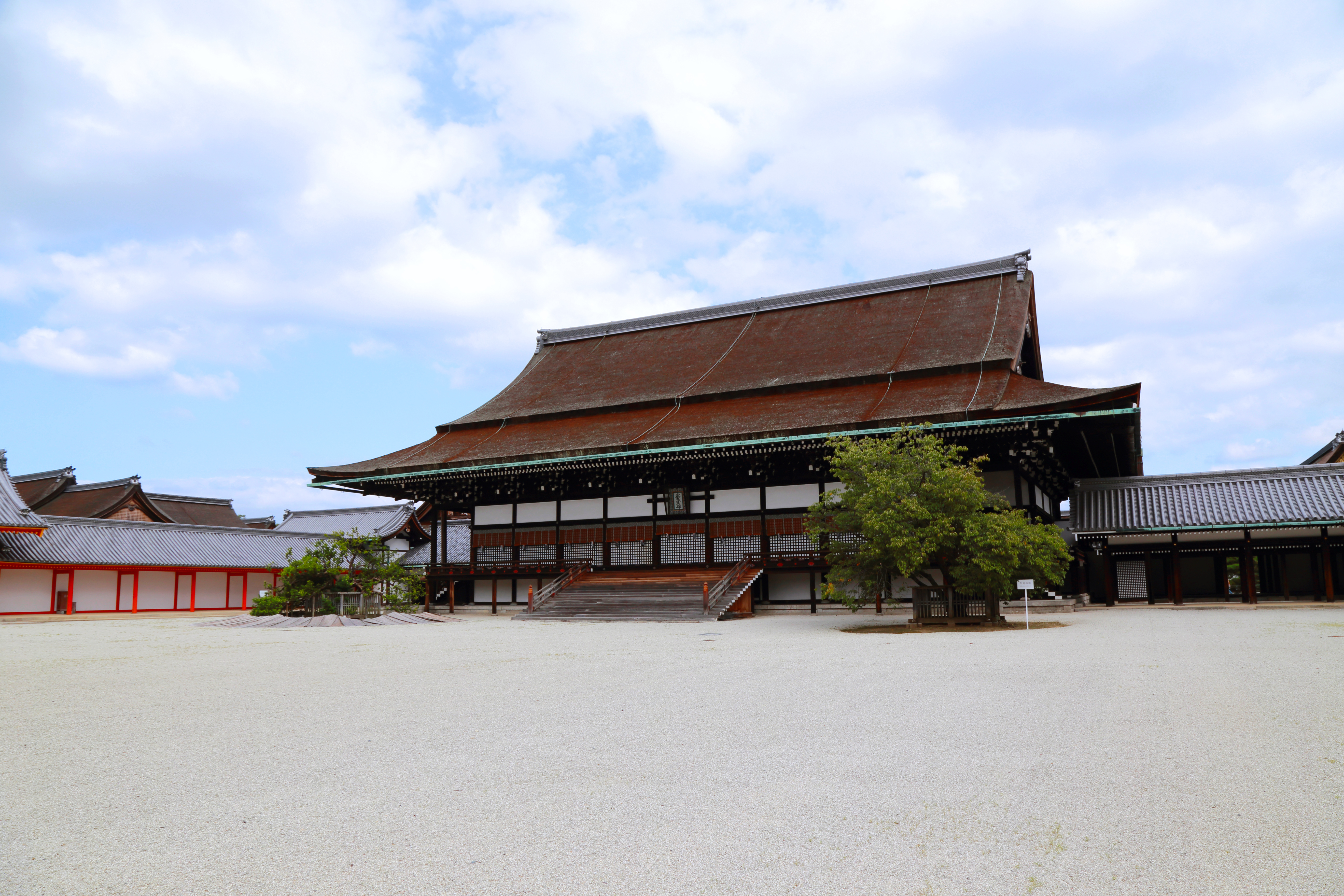 中文（中国大陆）: 京都御所外朝部分正殿